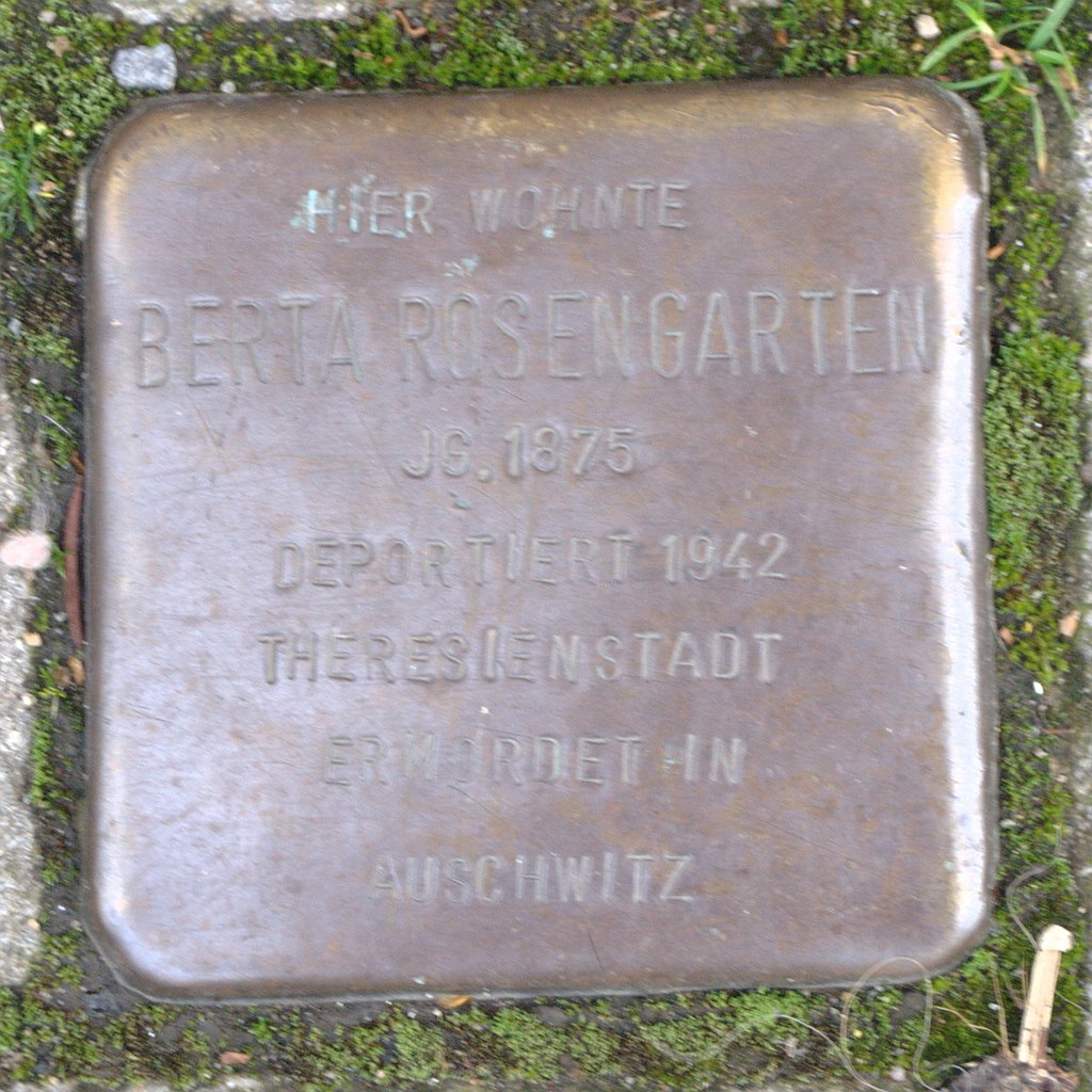 Stolperstein in Hattingen Berta Rosengarten